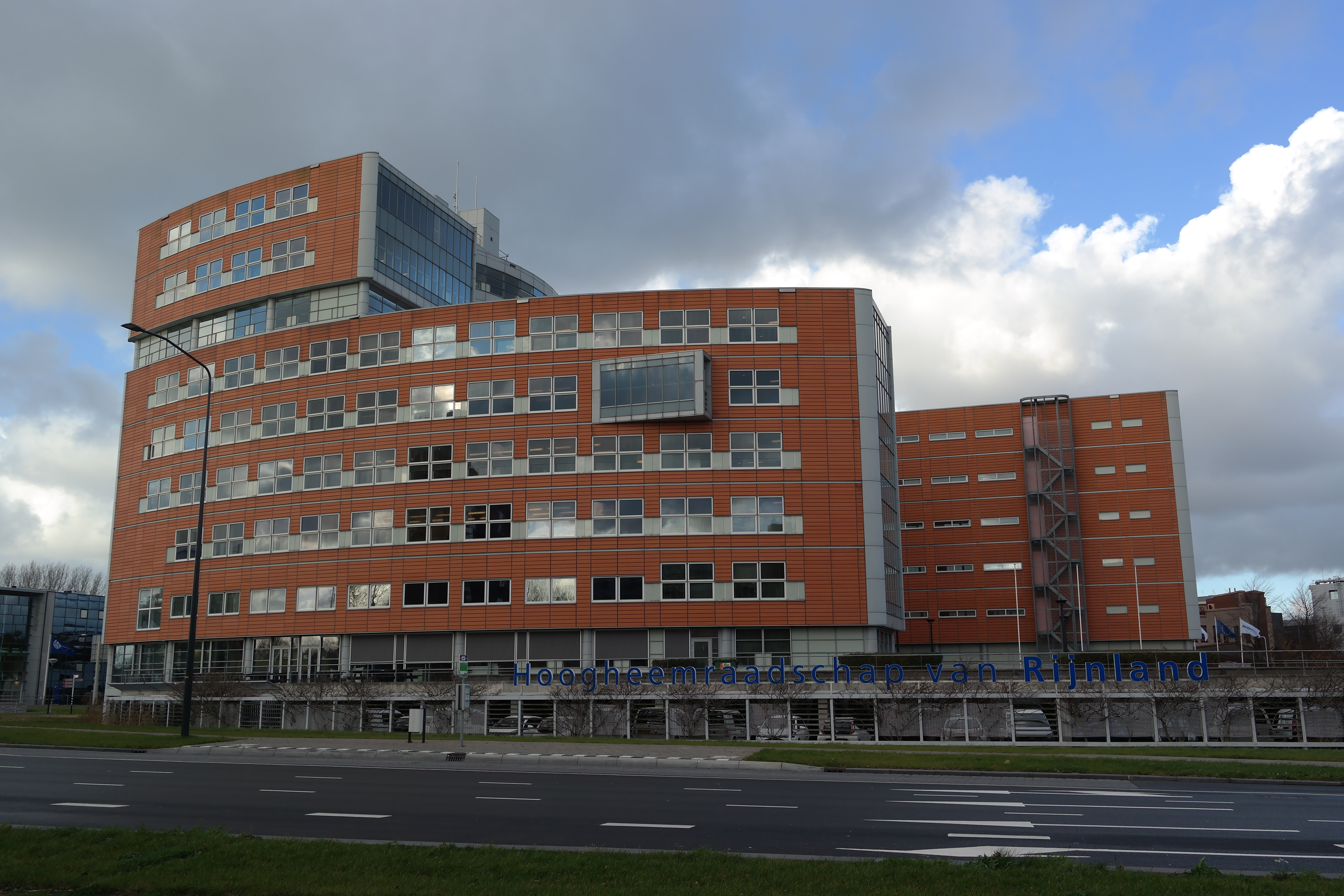 Het kantoor van het Hoogheemraadschap Rijnland aande Leidse Archimedesweg.